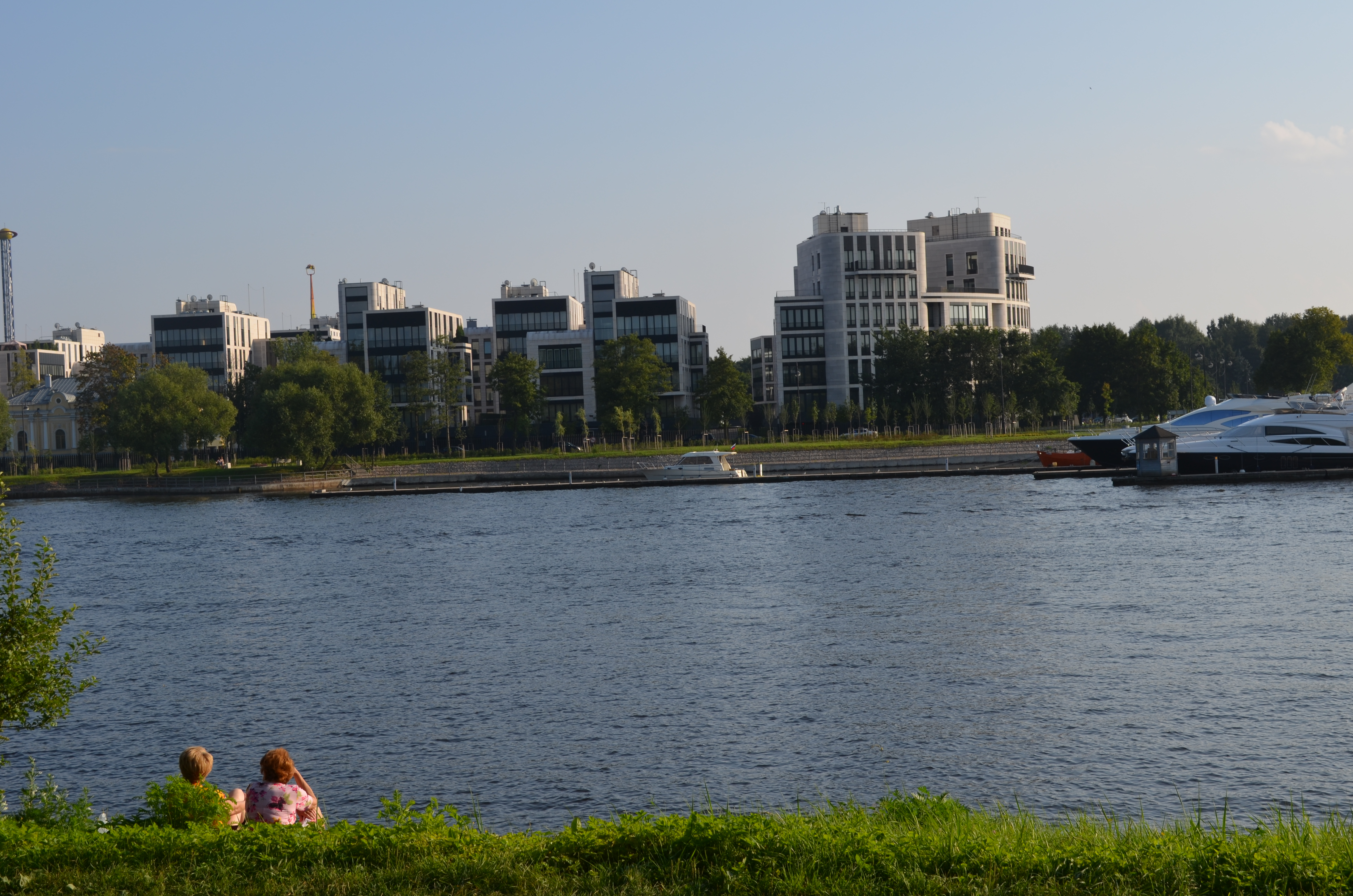 Вид на Крестовский остров, Санкт-Петербург